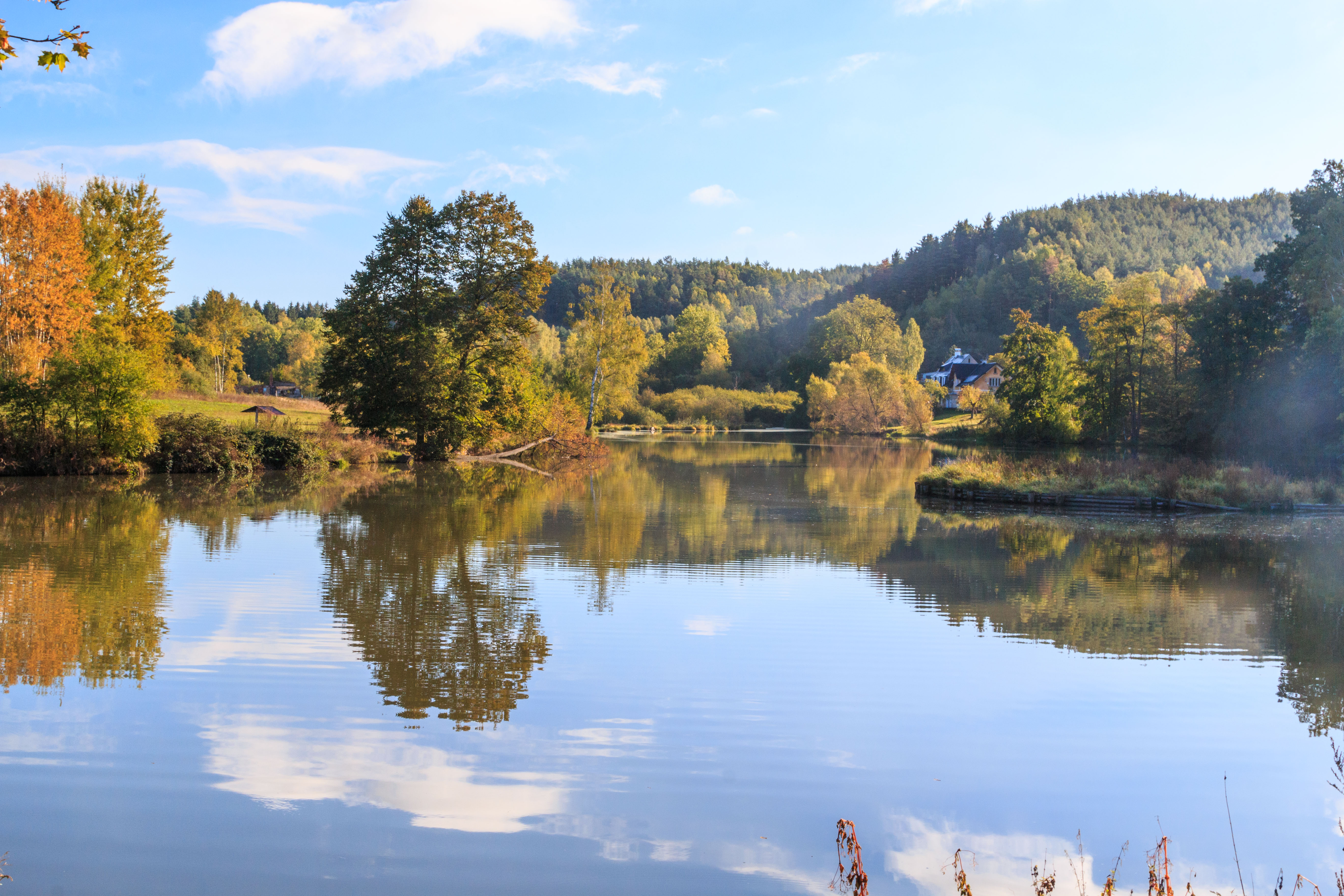 Dvorský rybník u Lvové Project: Vodstvo.